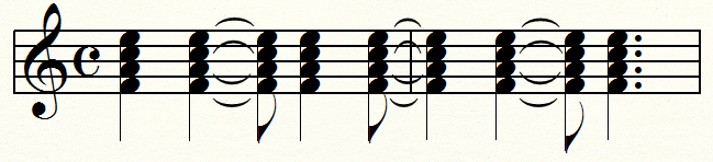 одна из типичных ритмоформул босса-новы (Ж. Жилберту)